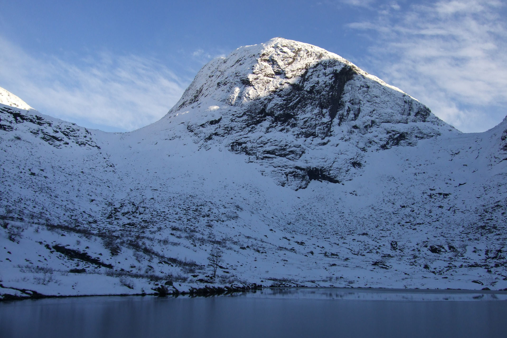 Steindalsegga sett frå Botnen, som er indre del av Knutsdalen i Hornindal. Ved foten av fjellet ligg Botnavatnet, også kalt Seljesetvatnet